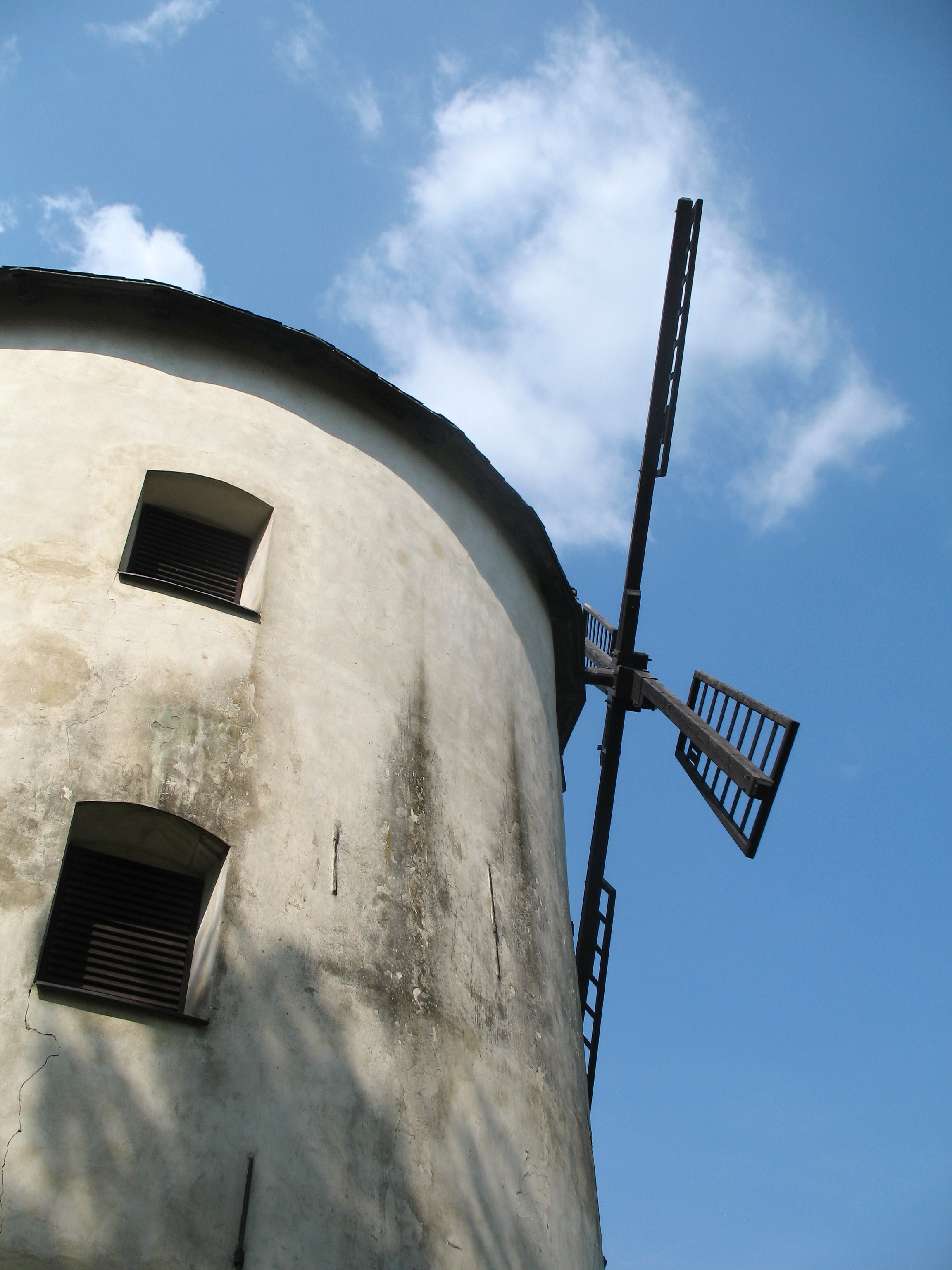 Větrný mlýn ve Městě Libavá, okres Olomouc